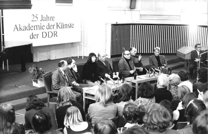 ADN-ZB-Kutscher 11.4.75 Berlin: Plädoyer für Poesie war der Titel einer Schriftstellerlesung der Akademie der Künste der DDR am 10.4.75. Aus Anlaß des 25. Jahrestages der Akademie lasen Günther Deicke, Volker Braun, Sarah Kirsch, Wieland Herzfelde, Franz Fühmann und Stephan Hermlin (v.l.n.r.). Die Leitung der Diskussion hatte Günther Rücker (5.v.l.) übernommen.